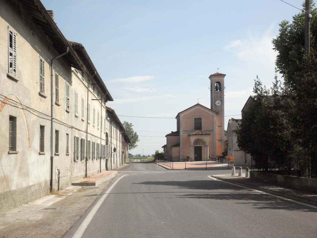 Via Roma a Casaletto Lodigiano, parte della provinciale n. 166.